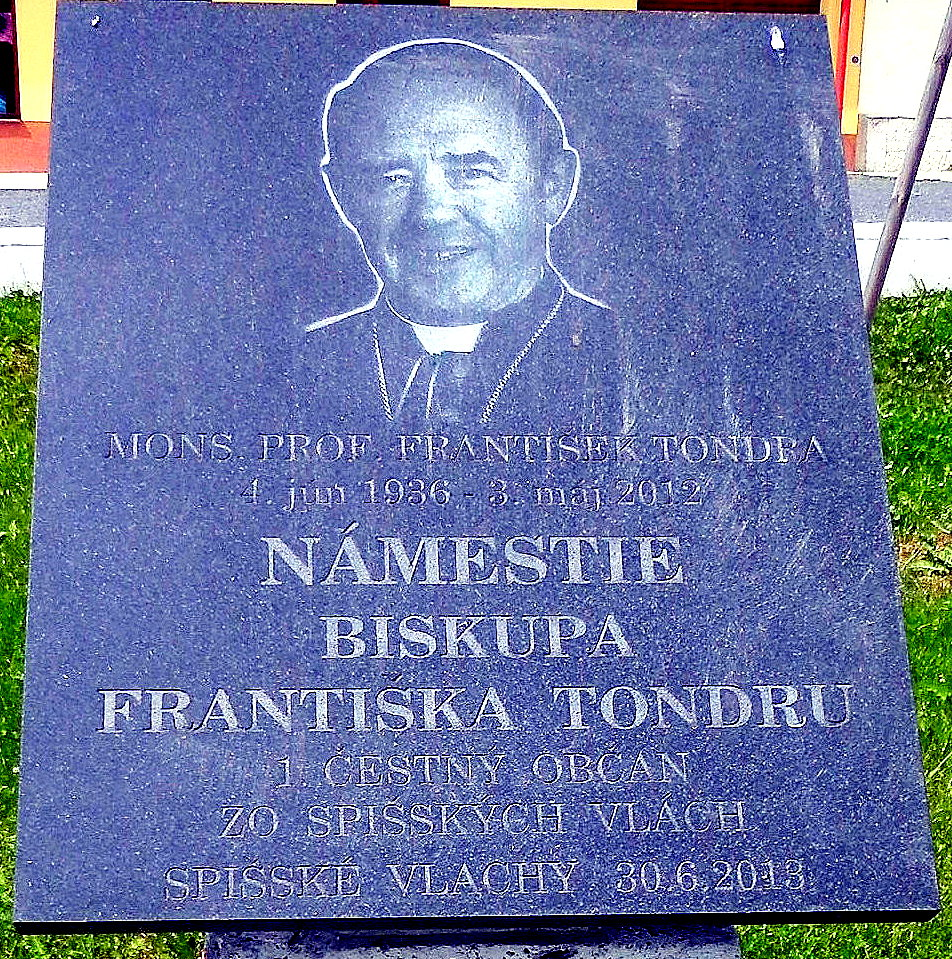 Pamätná tabuľa - biskup. Mons. Prof. František Tondra (1936-2012). Ulica Kostolná. Mesto Spišské Vlachy.